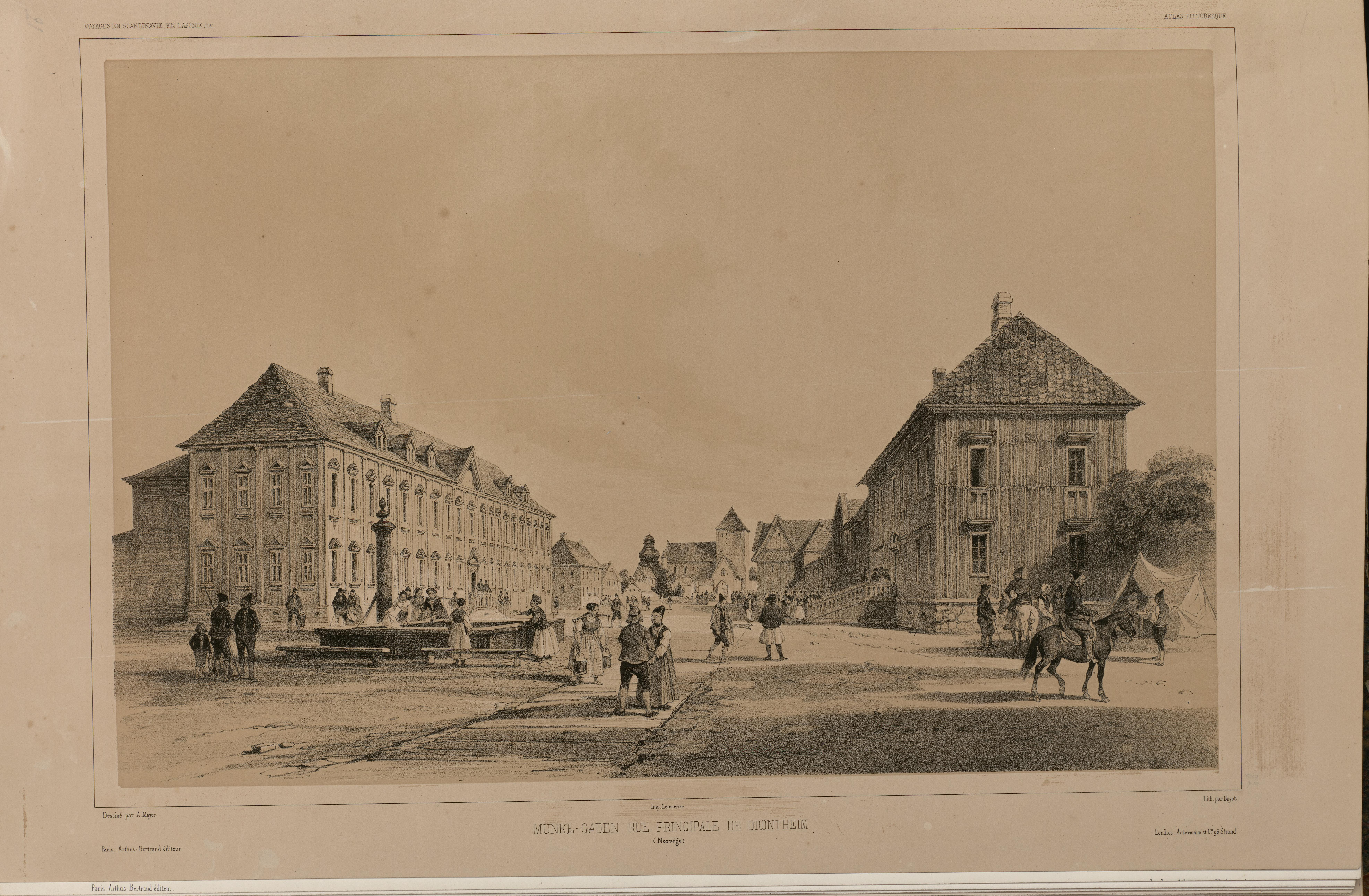 Illustrasjon hentet fra boken "Voyages de la Commission scientifique du Nord, en Scandinavie, en Laponie, au Spitzberg et aux Feröe" av ukjent forfatter og utgitt av Arthus BertrandParis : Arthus Bertrand, [1852] (Paris, [1852])